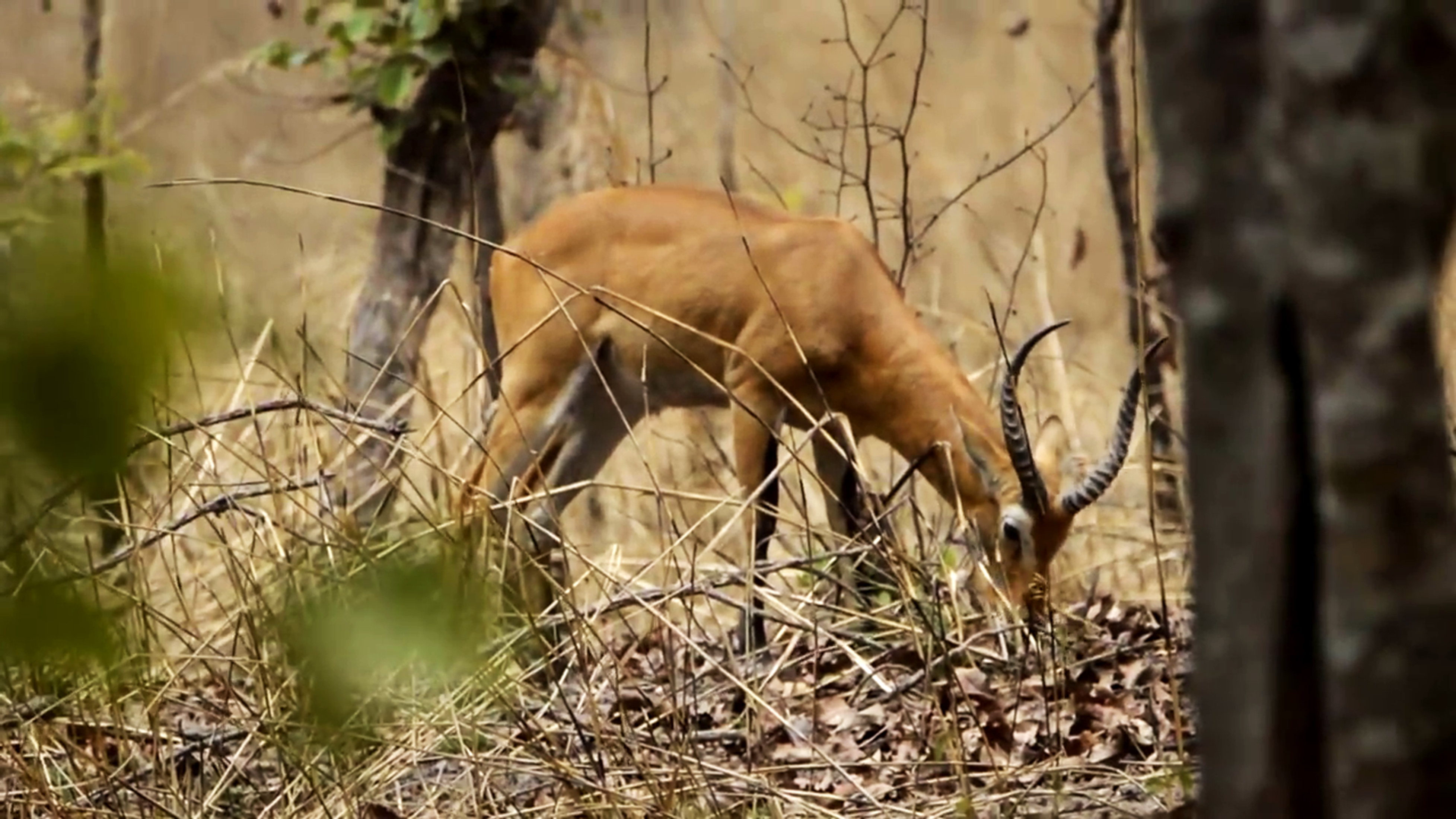 Le parc national de la Benoué est situé dans la région du Nord Cameroun